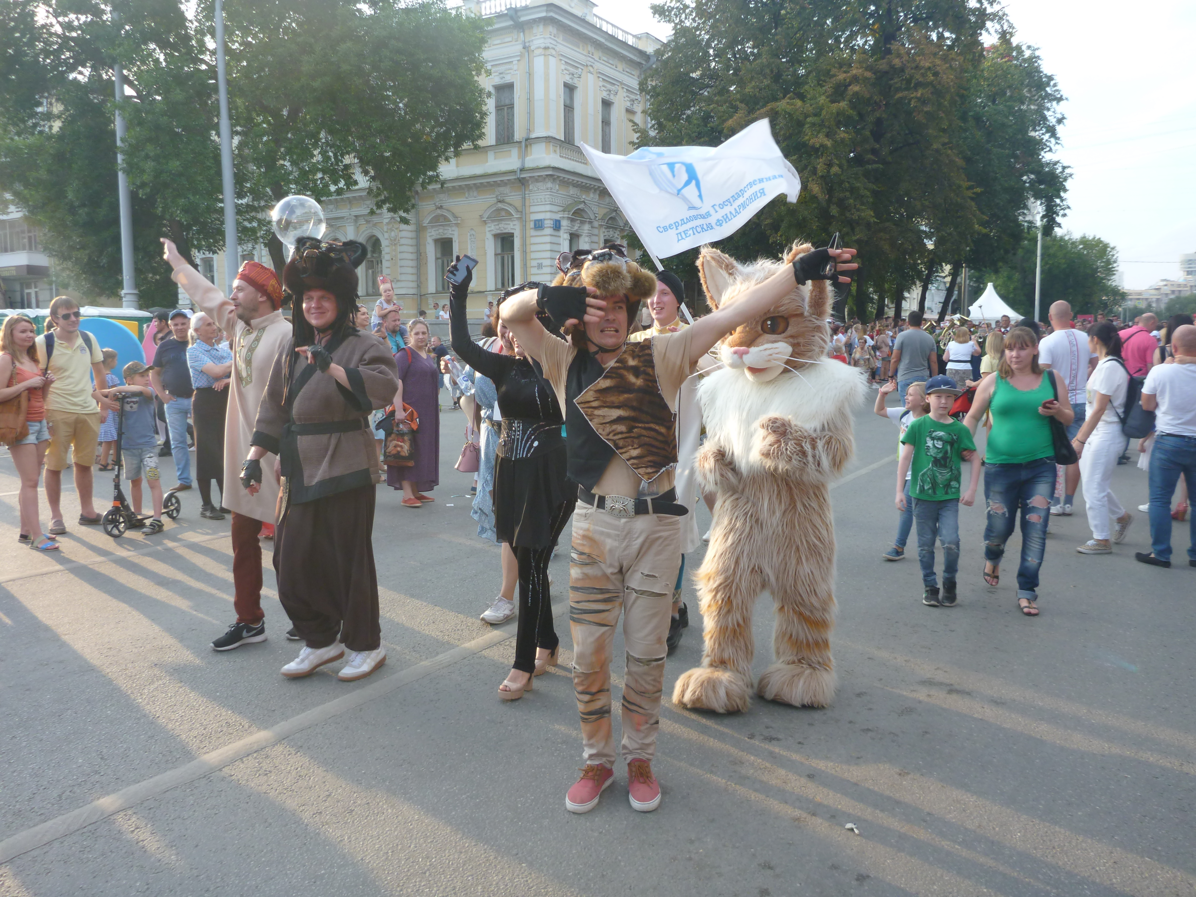 Свердловская детская филармония на Дне Екатеринбурга 17 августа 2019 года